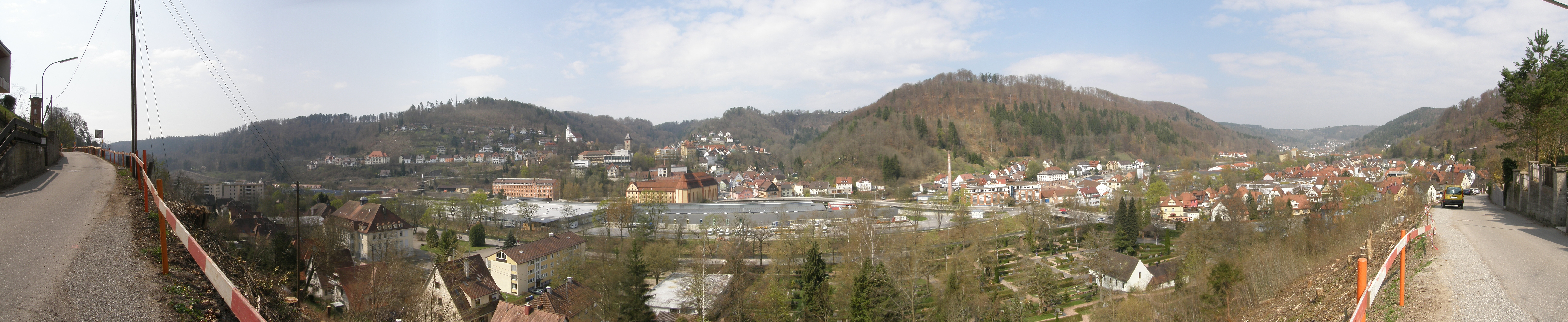 Panorama der Stadt Oberndorf am Neckar